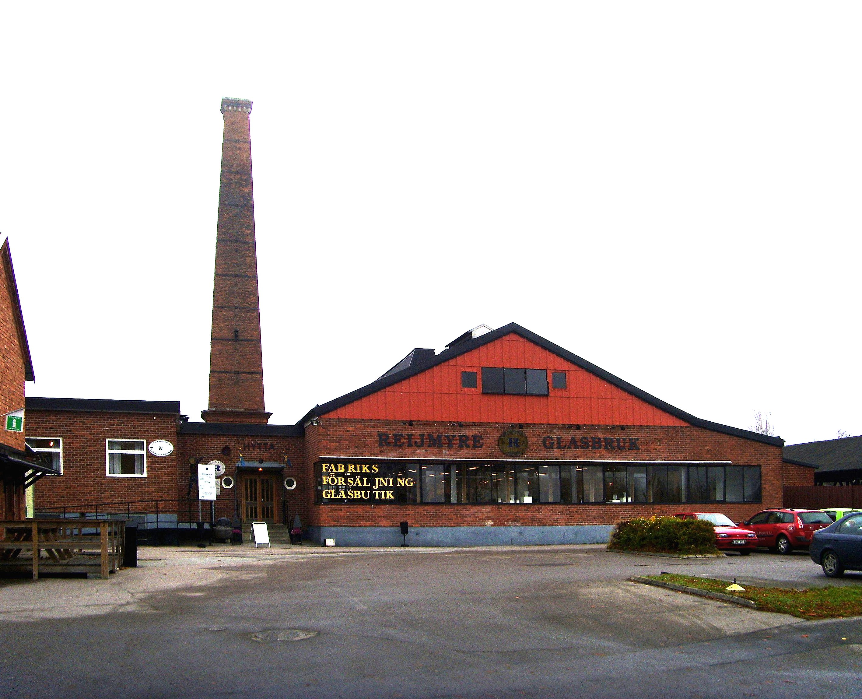 Reijmyre glasbruk i Rejmyre grundades 1810.